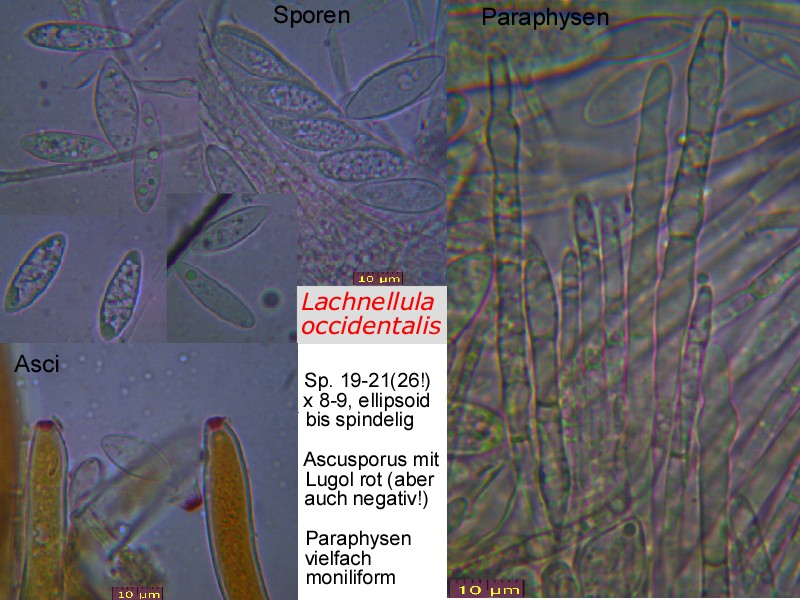 Mikroskopische Aufnahmen von Lachnellula occidentalis